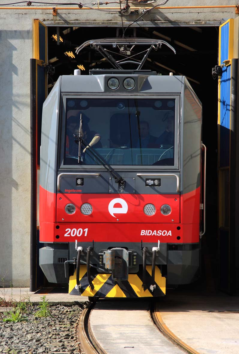 La locomotora Euskotren TD 2001 BB "Bidasoa" de EuskoKargo en los Talleres de Lutxana (Erandio, Bizkaia, Euskadi).